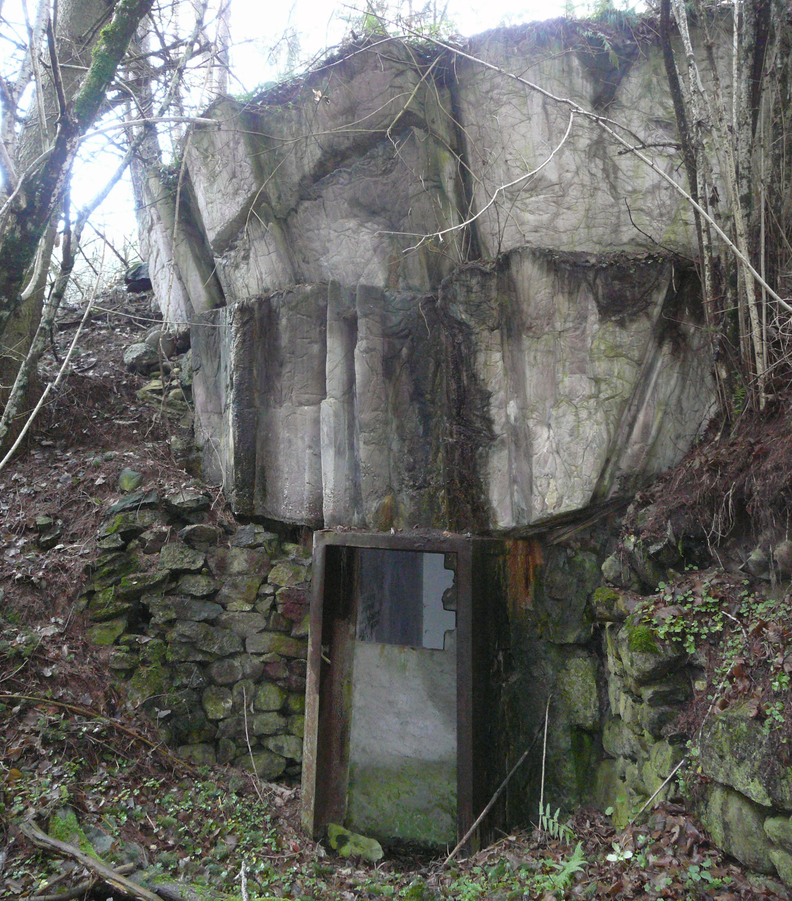 Opera 29 Sciaves